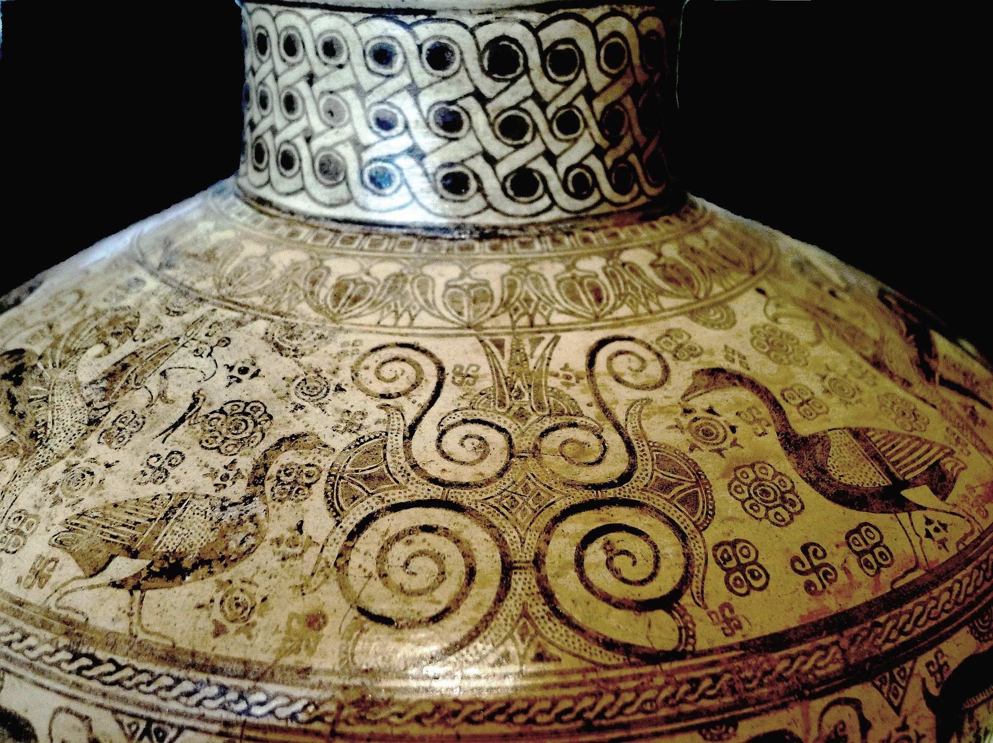 Sphinges, griffons, oies, chèvres, et daims.